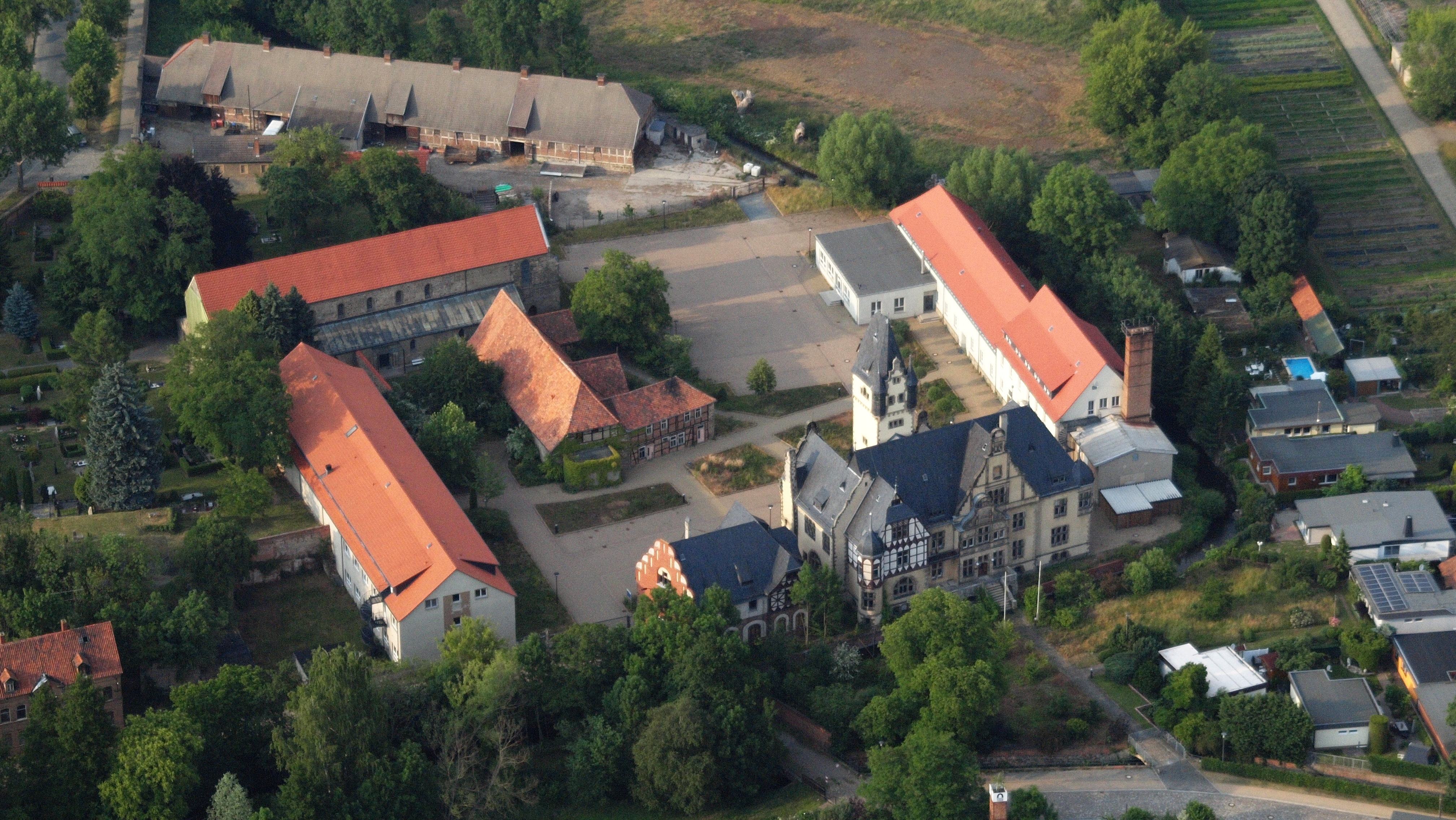 Quedlinburg, Bereich Hüttenweg, St. Wiperti und Gutshaus